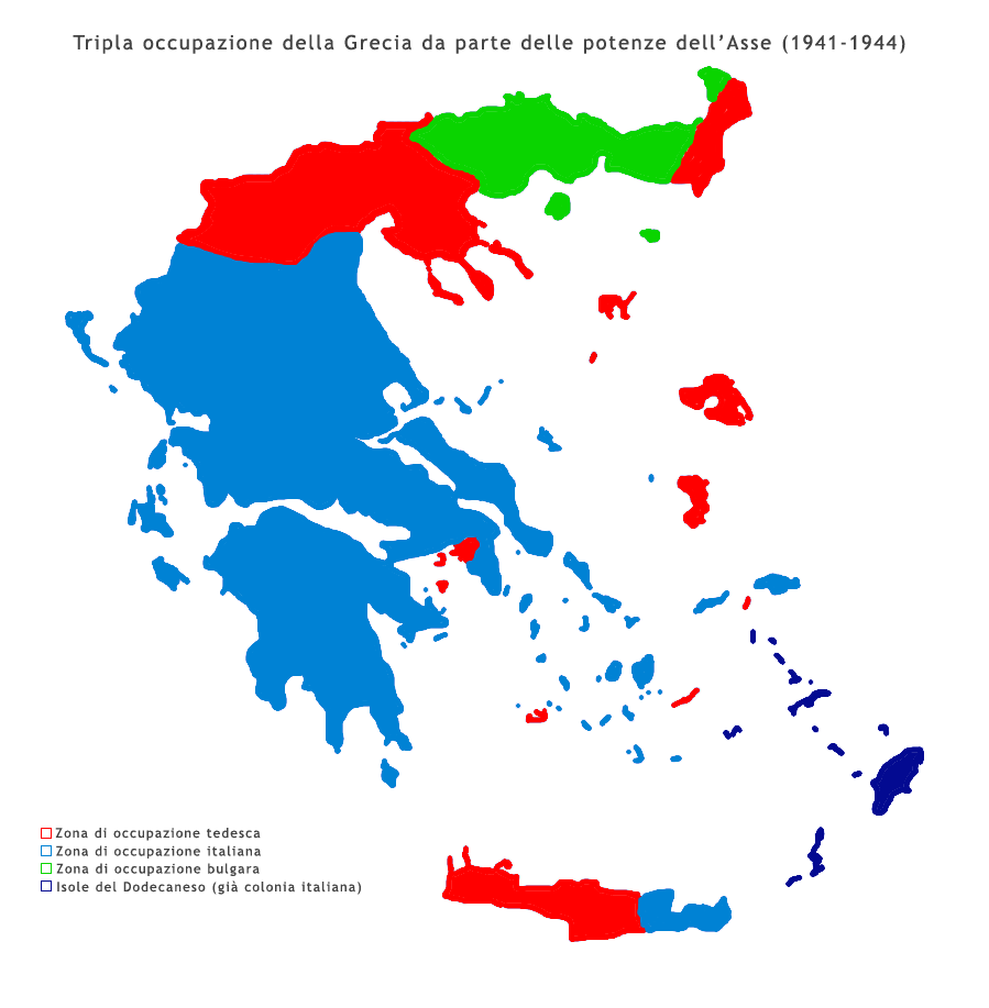 Zone di occupazione tedesche, italiane e bulgare della Grecia durante la Seconda guerra mondiale